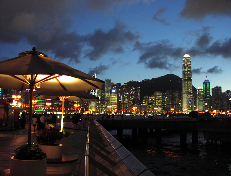 Template:A＝香港星光大道 B＝tksteven自行拍攝 C＝2004.2 D＝tksteven E＝ F＝